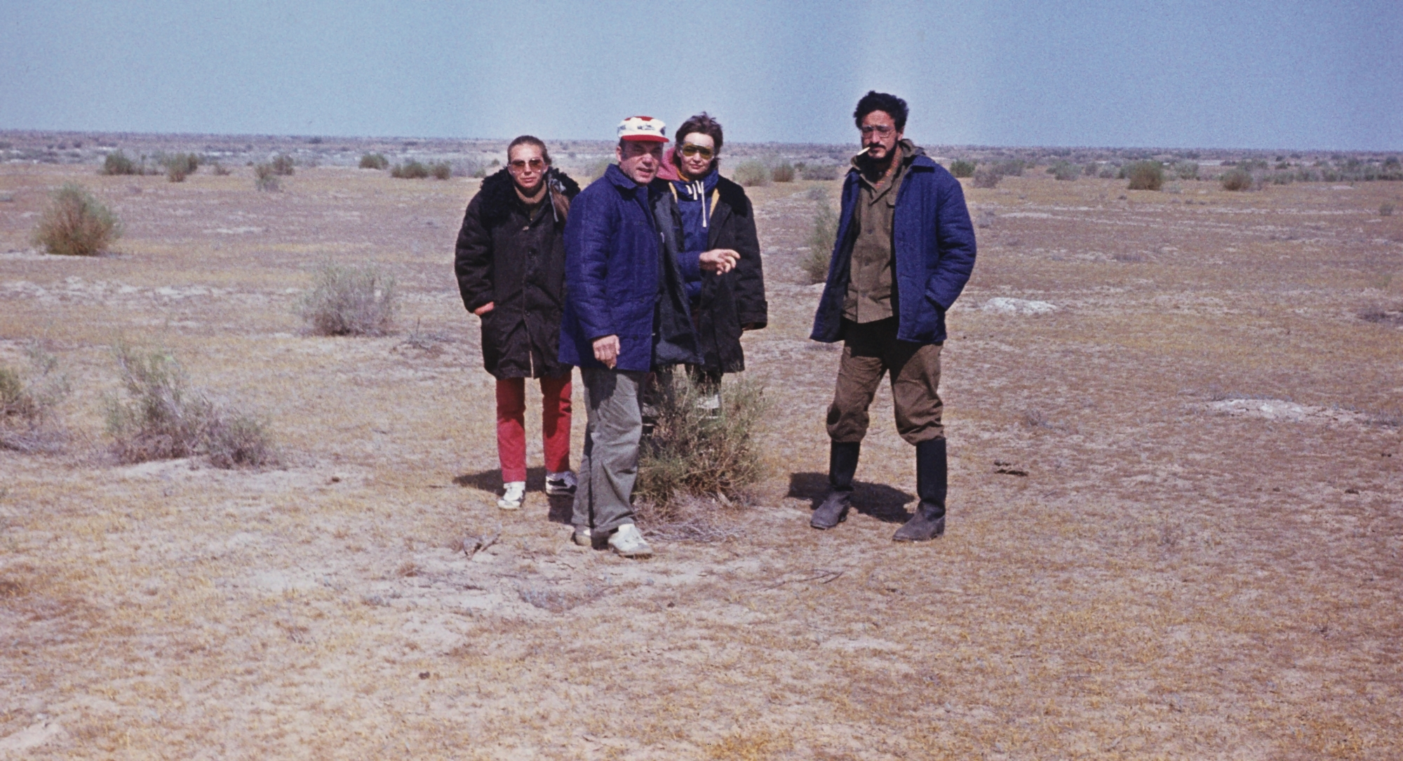 Экспедиция Лаборатории биогеографии ИН АН СССР в пустыню Кызыл-Кум